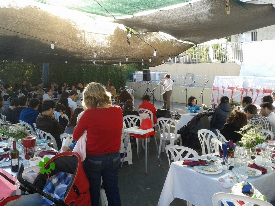 חברי קיבוץ משעול עורכים סדר פסח שני. ההגדה נכתבה ונערכה על ידי צוות מהקיבוץ. בכל שנה מתחדשת היצירה, לצד מסורות בשירה ובהופעה. הופעות היתוליות לצד מדרשים ושאלות עומק.